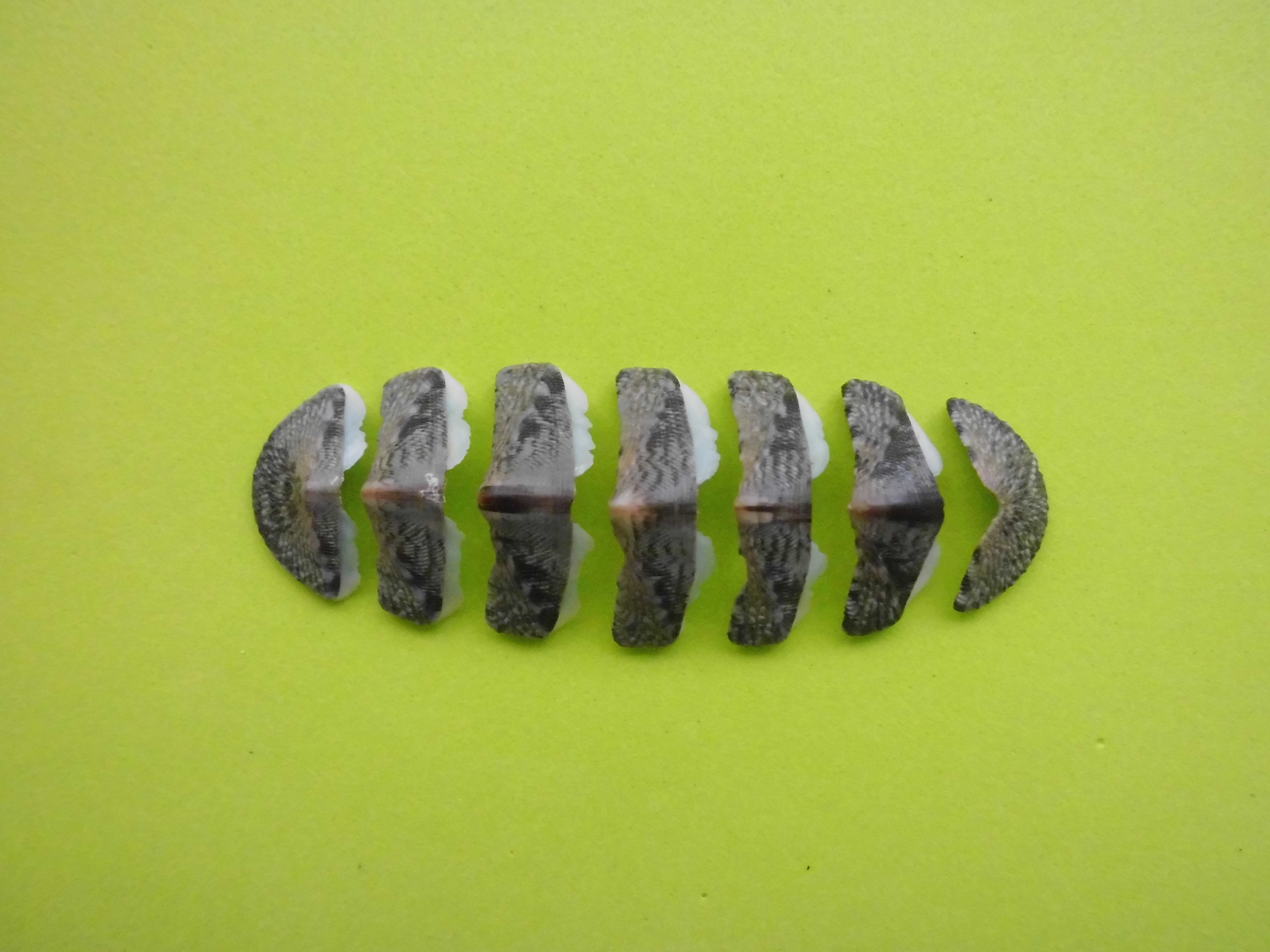 Chiton (Chiton) marmoratus Gmelin, 1791 (placas) colectado en 1963 en el Archipiélago Los Monjes, Dependencias Federales - Venezuela